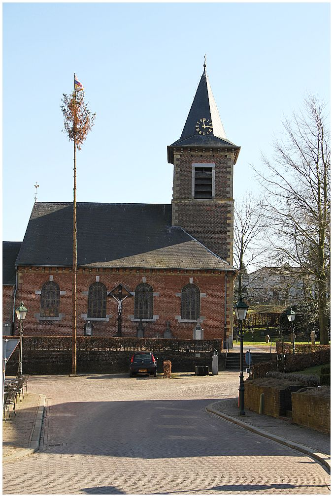 Vanaf de Dorpsstraat is er een mooie doorkijk naar de St. Remigiuskerk.